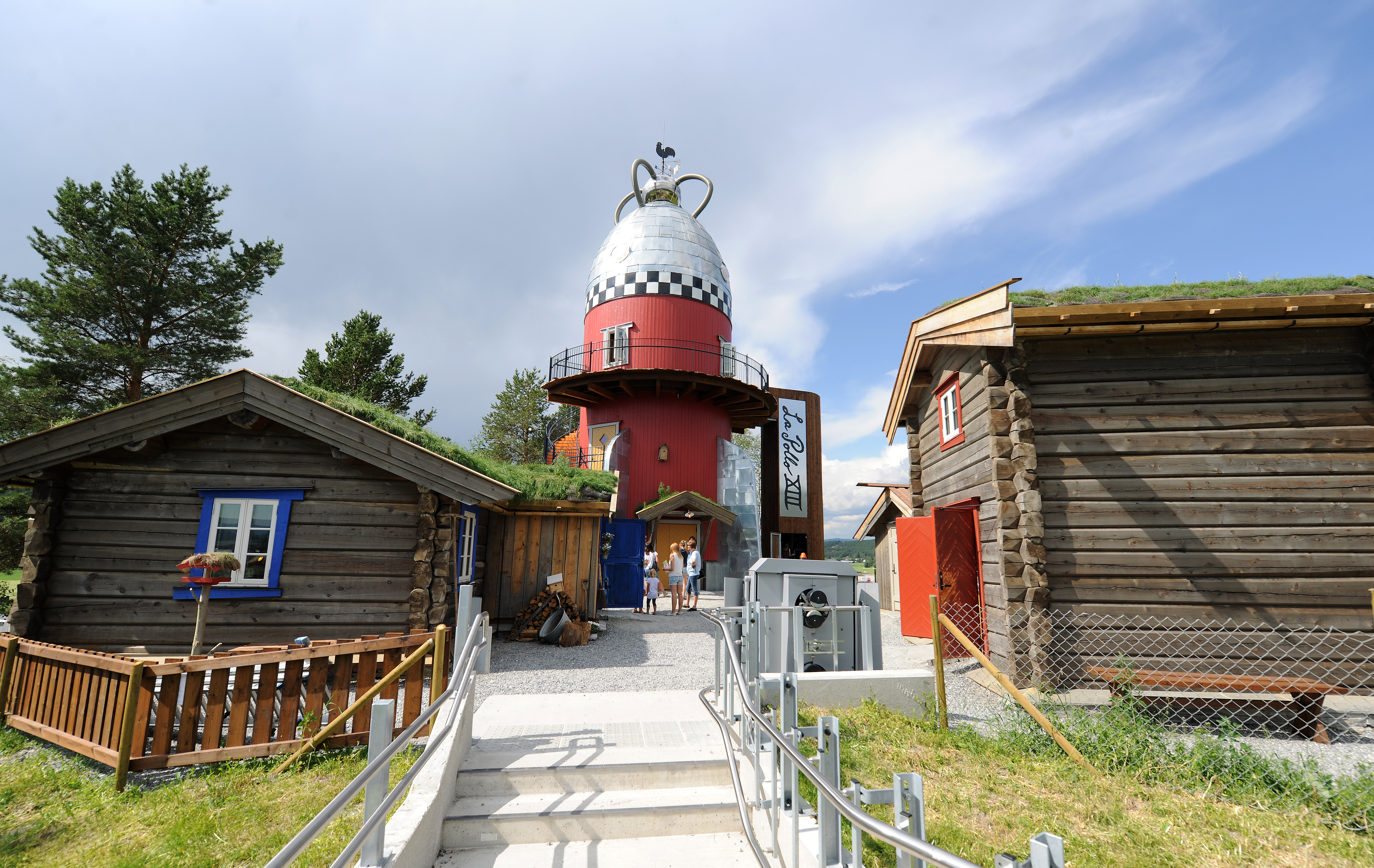 Aukrustsenterets nyeste attraksjon, Flåklypatoppen med Solan Gundersens egen månerakett. Åpnet i 2014.